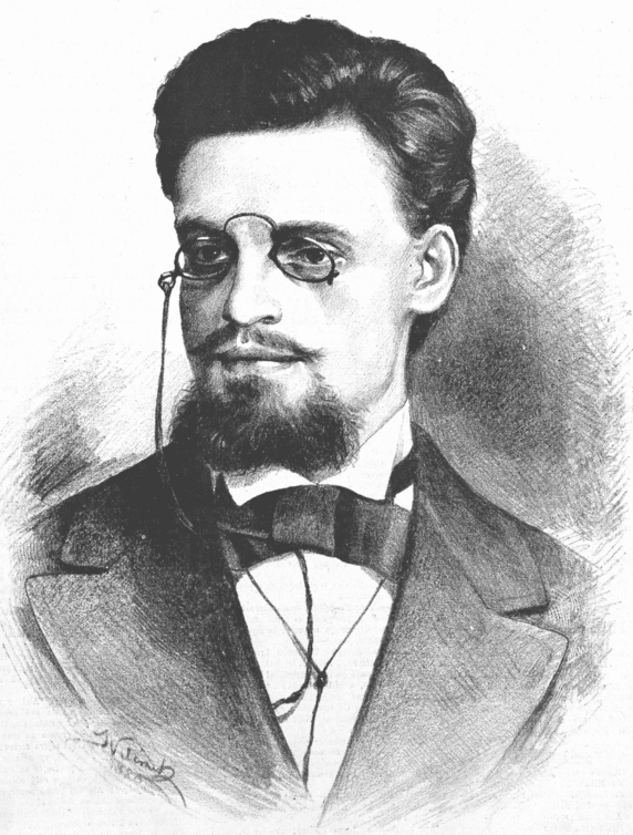 Jaromír Břetislav Košut (1854-1880), český orientalista. Portrét, nakreslený Janem Vilímkem pro Humoristické listy